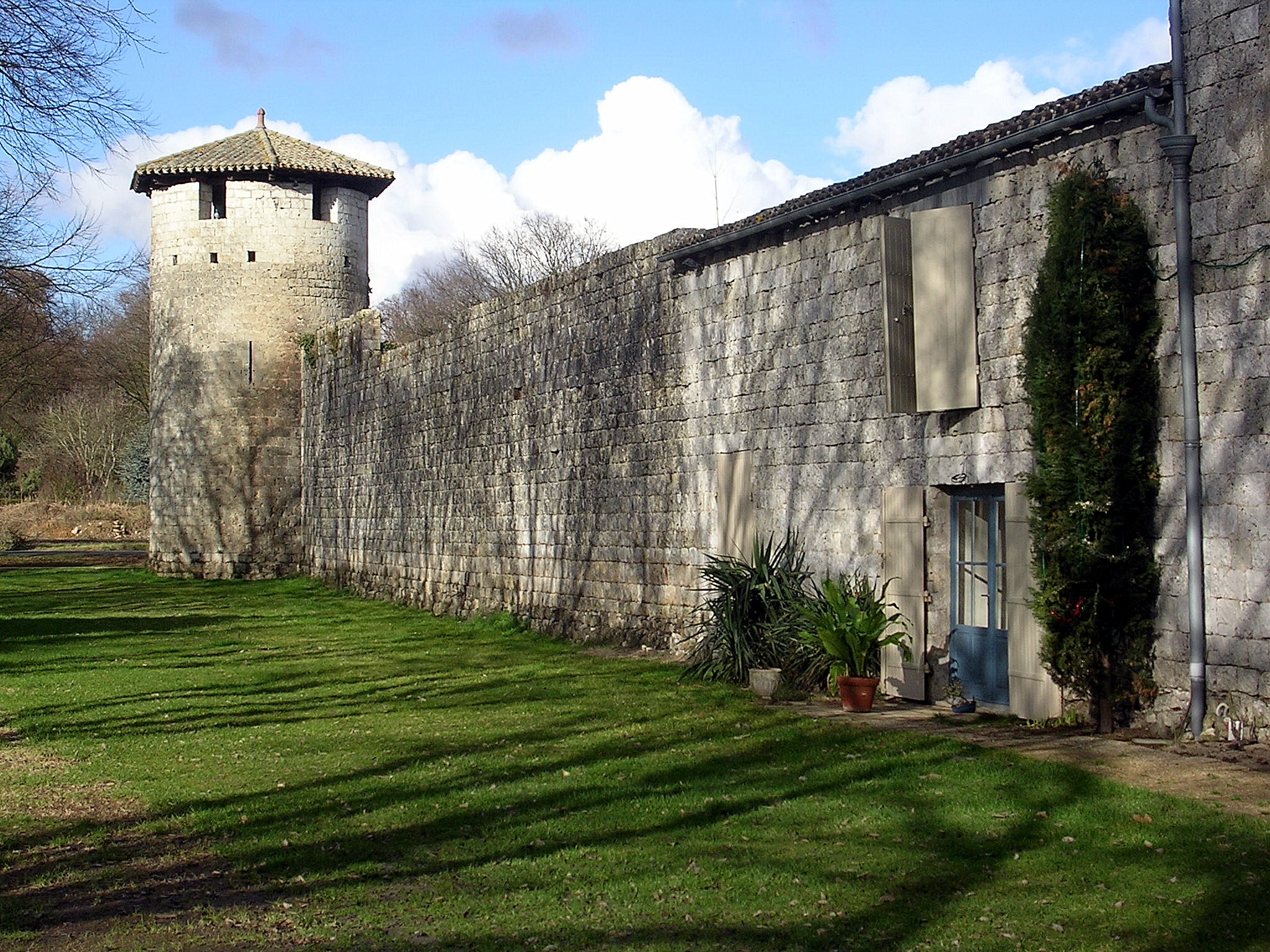 Vianne, enceinte de la ville bastide (Lot-et-Garonne)